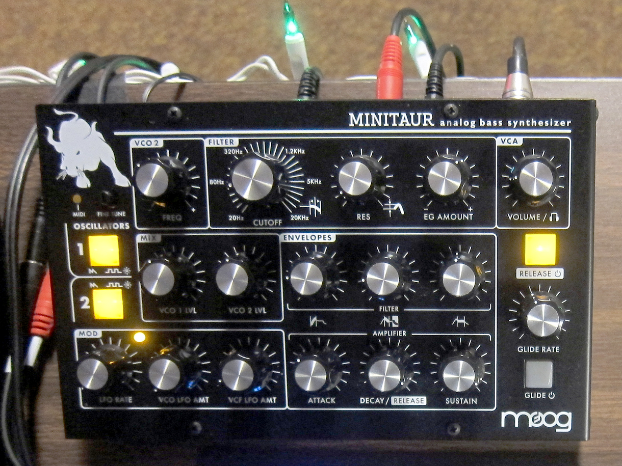 Moog Minitaur Analog Bass Synthesizer Moog Minitaur & QuNexus, PNW SynthFest 2013